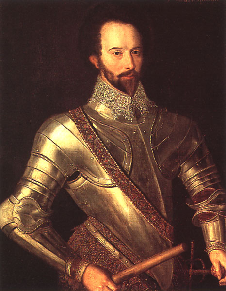 Portrait von Sir Walter Raleigh